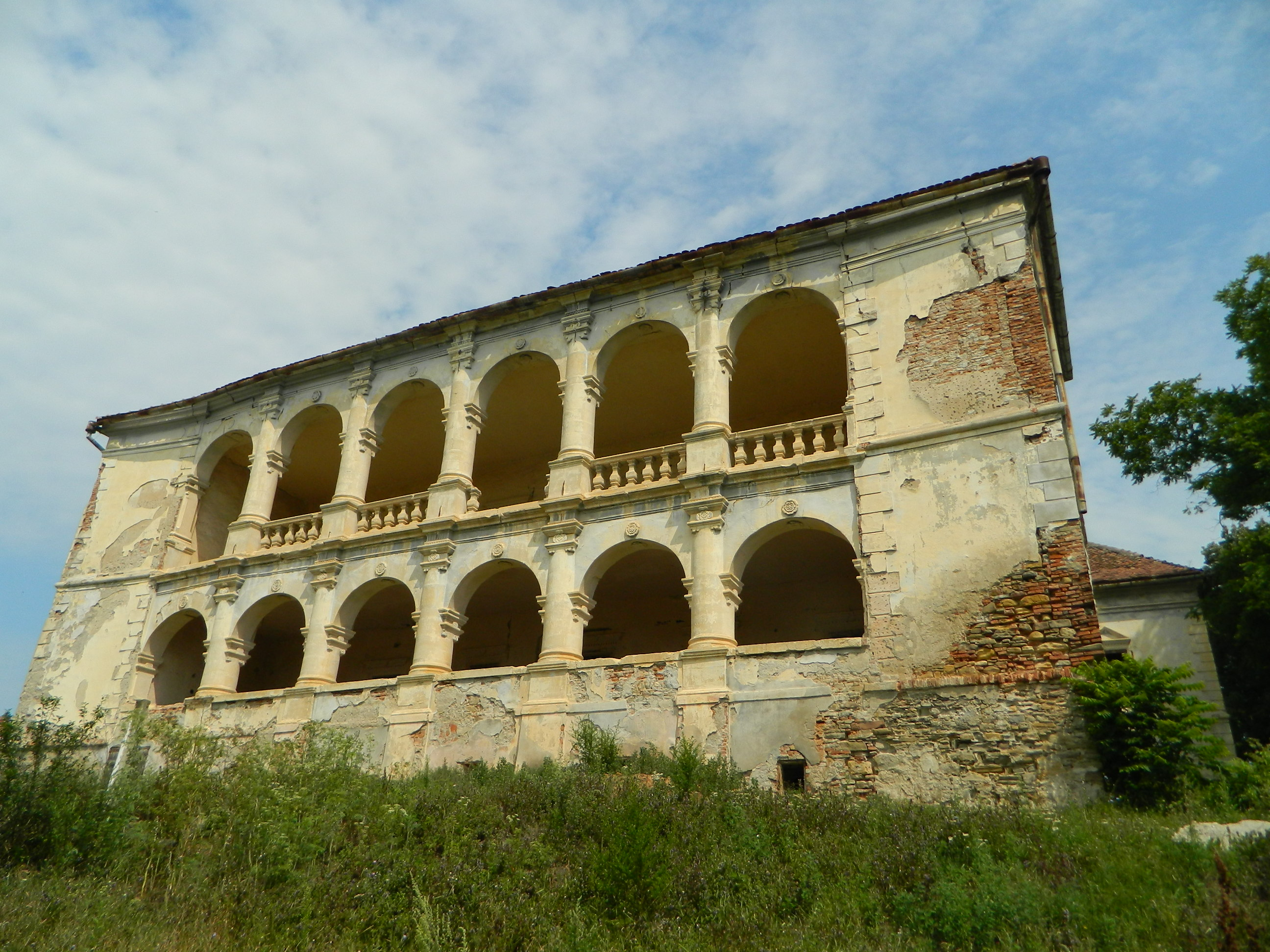 Castelul Bethlen 01